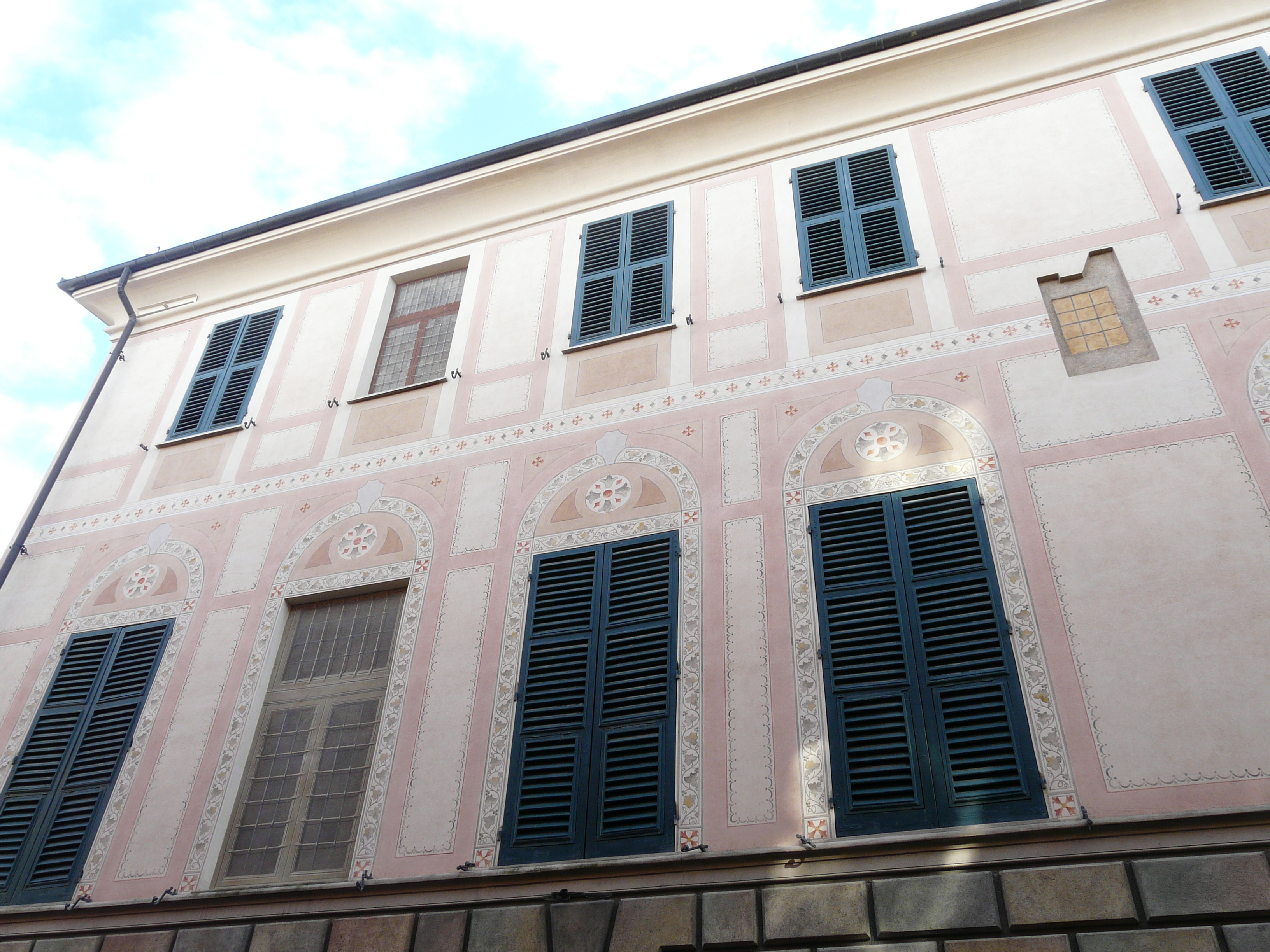 Palazzo Cassissa, Novi Ligure, Piemonte, Italia